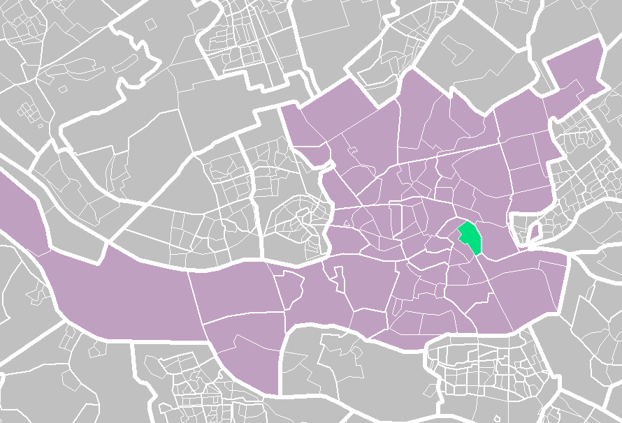 Rotterdam districts/neighboorhoods